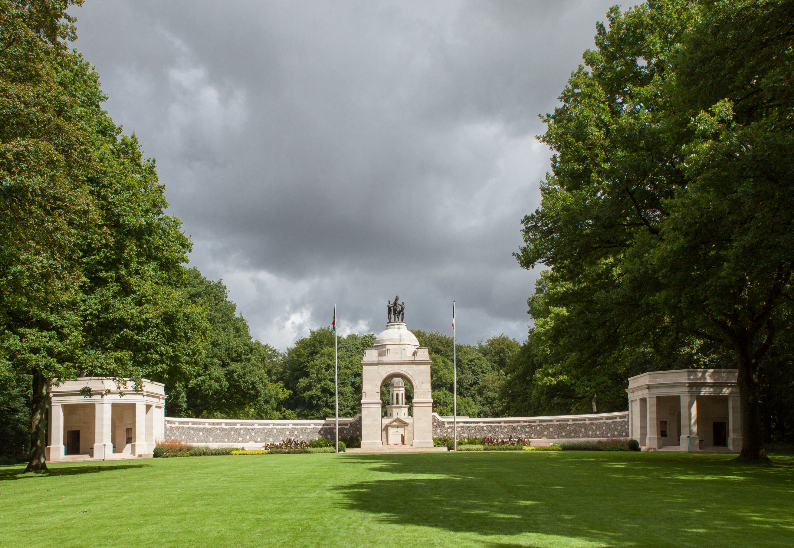 The South Africa (Delville Wood) National Memorial